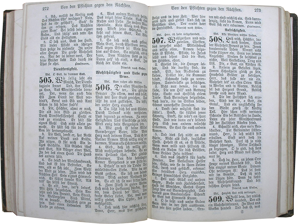 Die Kirchenlieder 505, 506, 507 und 508 im Neuen Braunschweigischen Gesangbuch, Druck 1887 (Erstausgabe zu Ostern 1780)